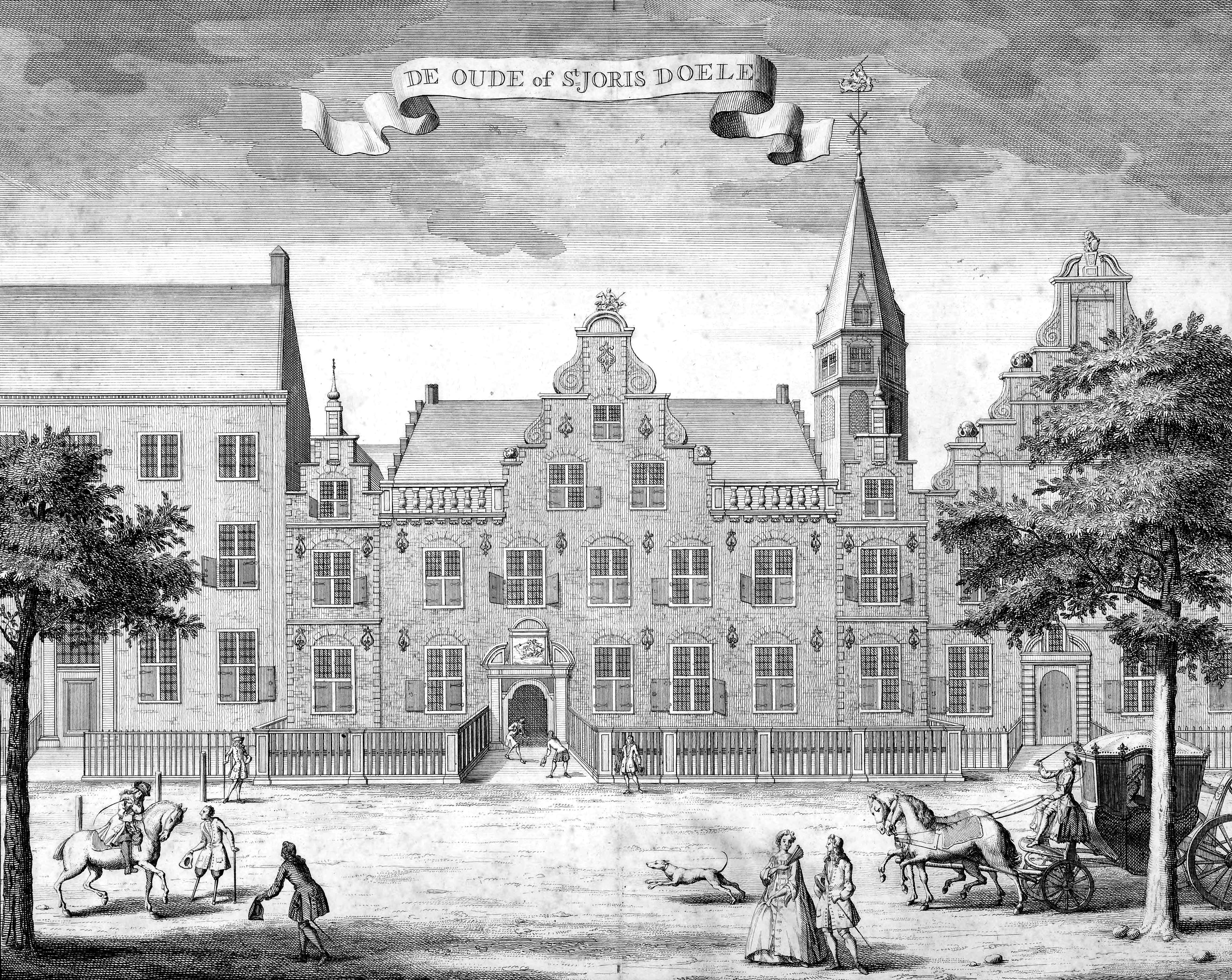 Afbeelding uit het boek van Mr. Jacob de Riemer genaamd: "Beschrijving van ’s Gravenhage, behelzende deszelfs oorsprong, benaming, gelegenheid, uitbreidingen, onheilen en luister, mitsgaders stichtingen van het Hof, der kerken, kloosters, kapellen, godshuizen, en andere voornaamelijk gebouwen. Zittingen der Hooge Colleges zo van politie als justitie; instellingen van het Kapittel ten Hove. Alsmede de privilegien, handvesten, keuren en wijze der regeringe. Uit zeer vele nooit gedrukte oorspronkelijke charters en bescheiden getrokken, opgeheldert en bevestigt." Het boek werd gedrukt te Delft bij Reinier Boitet in 1730.